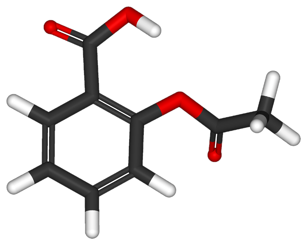 Aspirin-3D